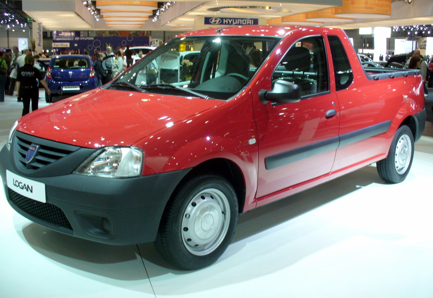 Dacia Logan Pickup